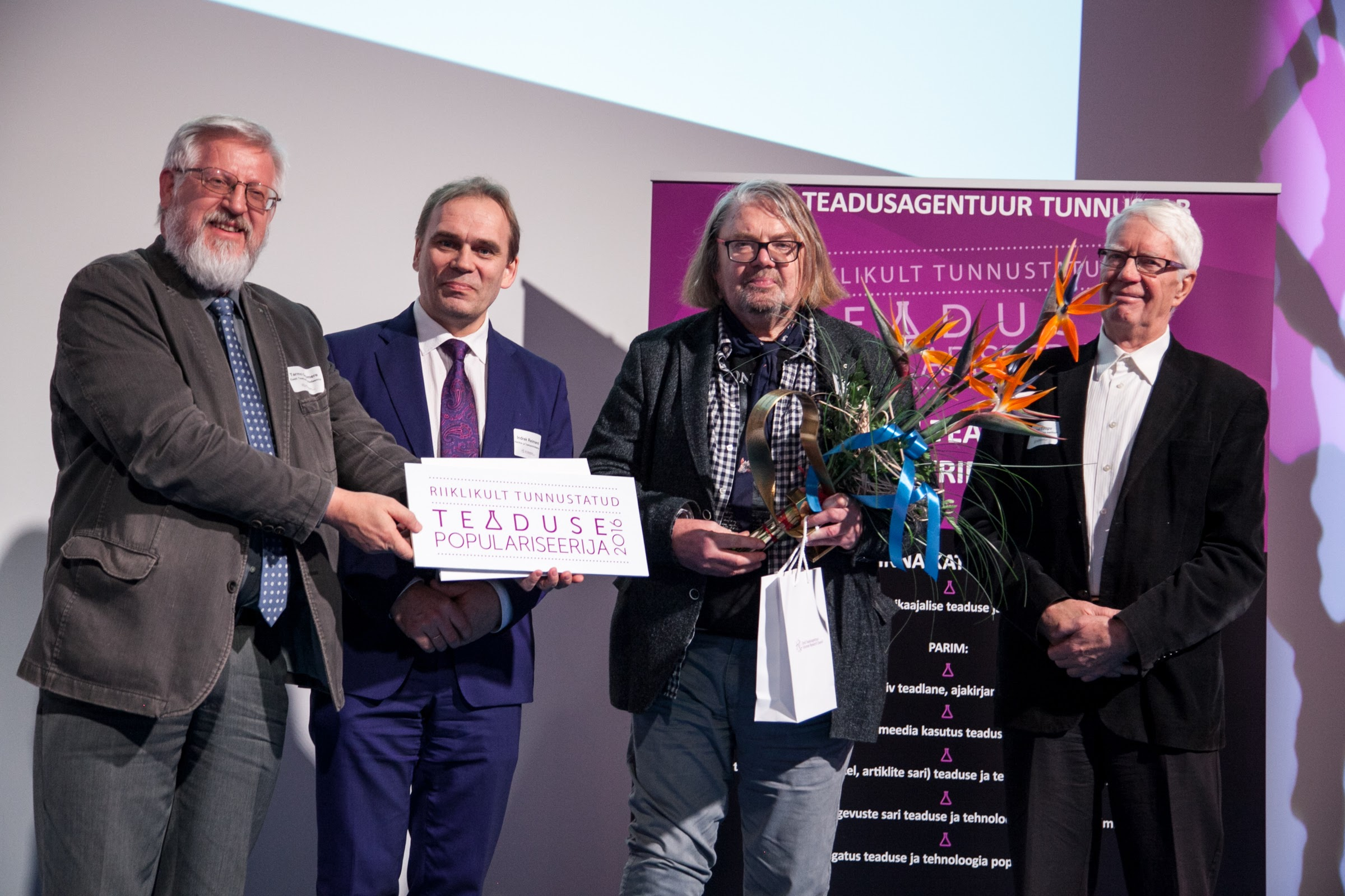 Tiit Kändler 2016. aasta teaduskommunikatsiooni konverentsil võtmas vastu teaduse populariseerimise auhinda.